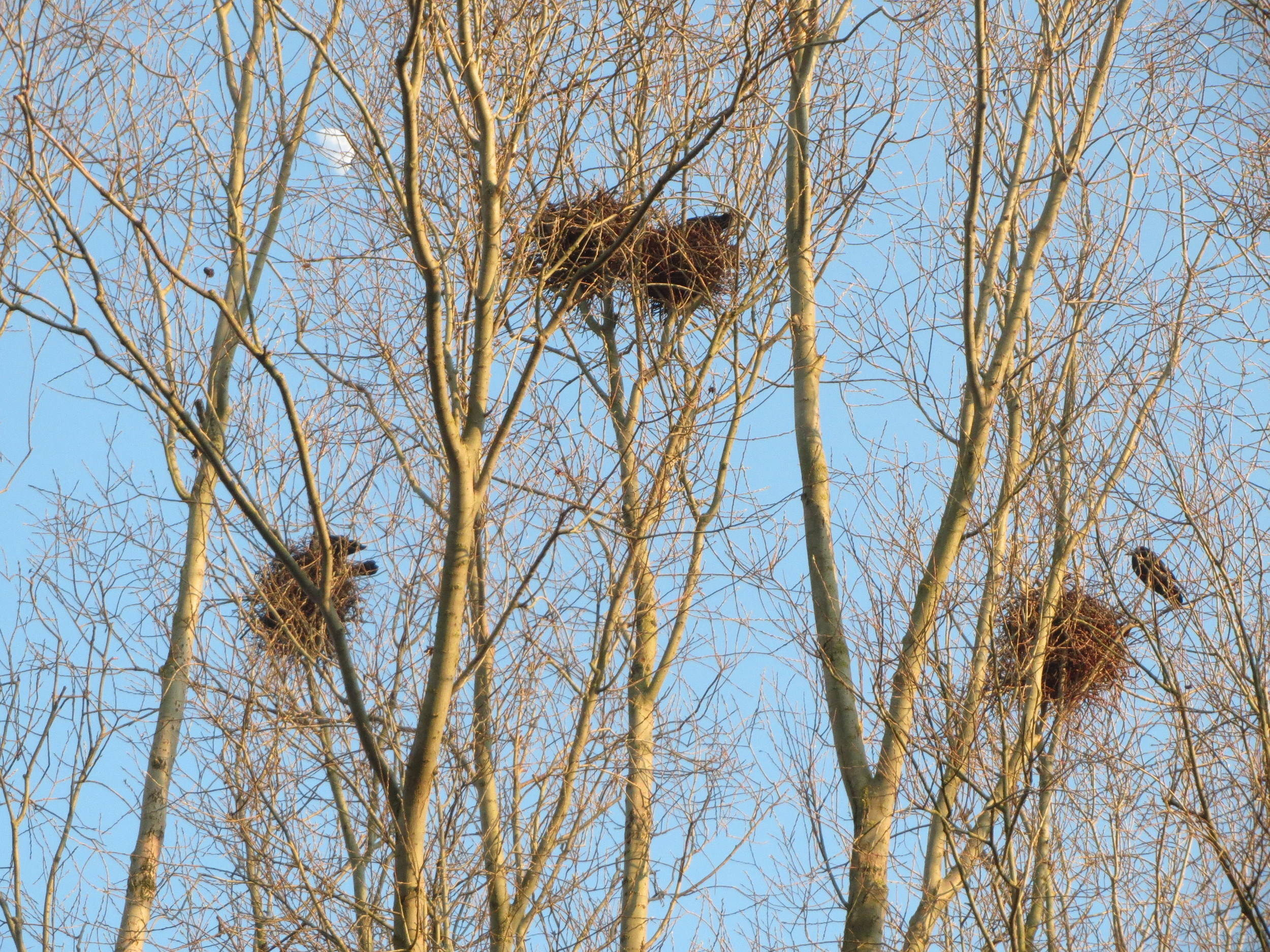 Aaskrähen (Corvus corone) in ihren Nestern in Hockenheim